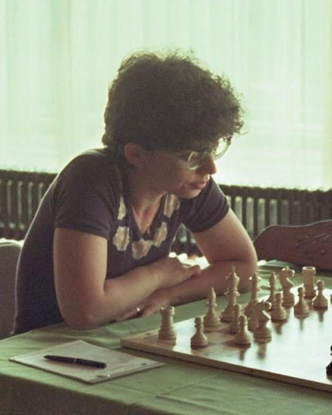 Borislava Borisova 1982 in Bad Kissingen